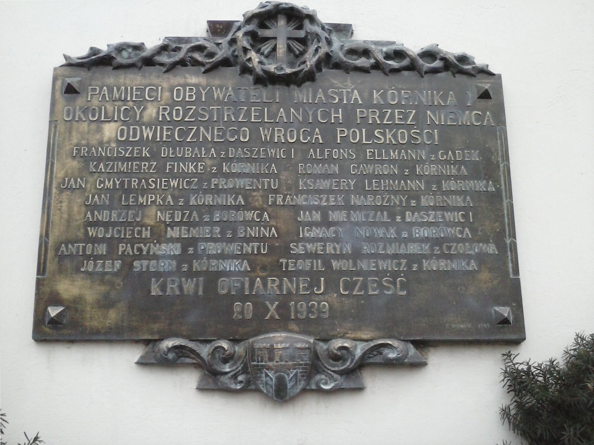 Tablica upamiętniająca egzekucję Polaków przez Einsatzkommando 11 pod dowództwem Heinza Graefe w Kórniku 20 października 1939